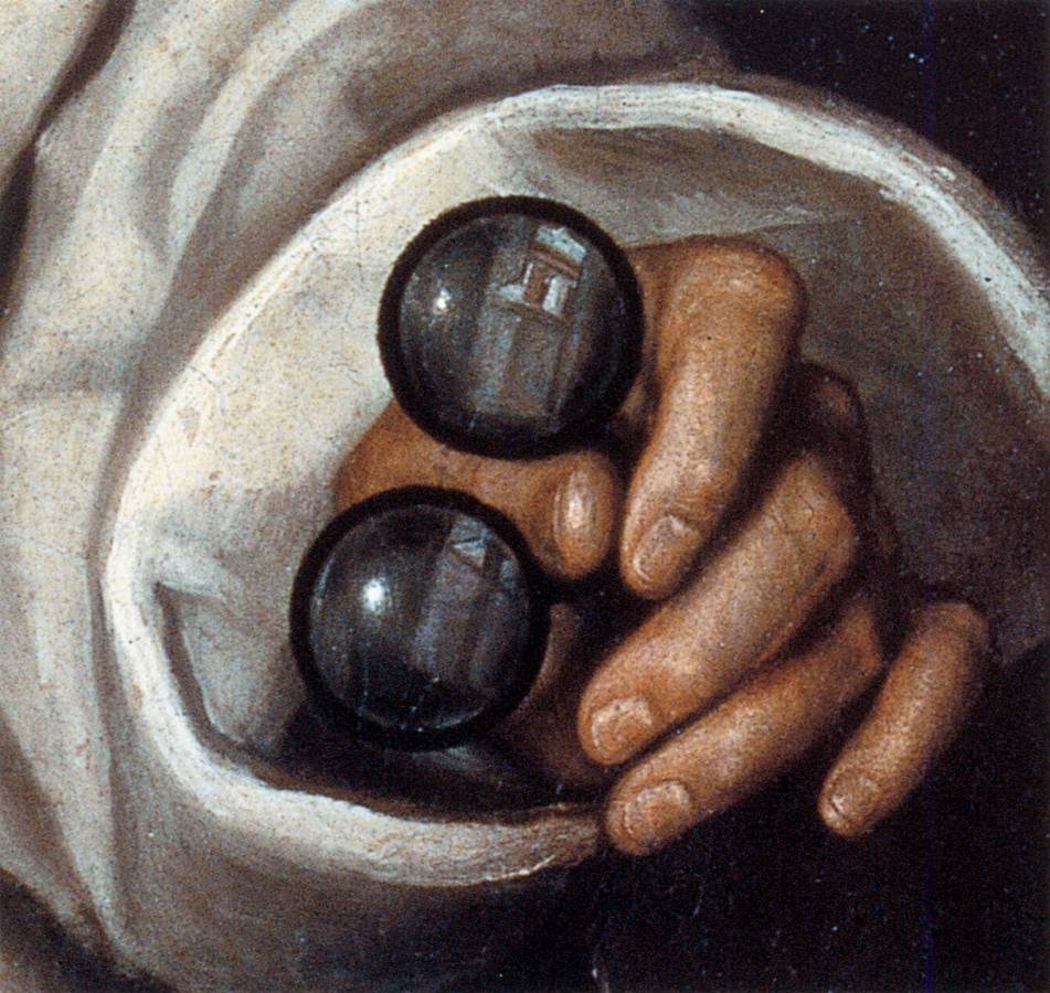 detail: glasses